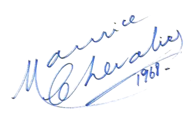 podpis Maurice Chevaliera